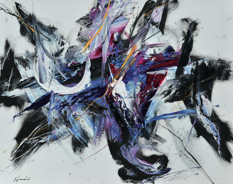 Folle gestualità, 60×70 cm, Olio su tela, 2012, opera di Silvio Formichetti